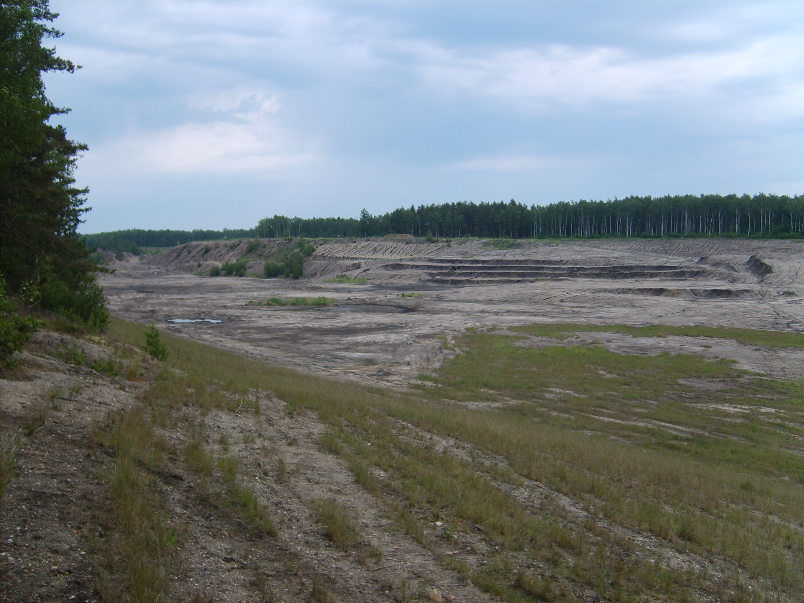 Tagebau-Restloch 124 Domsdorf